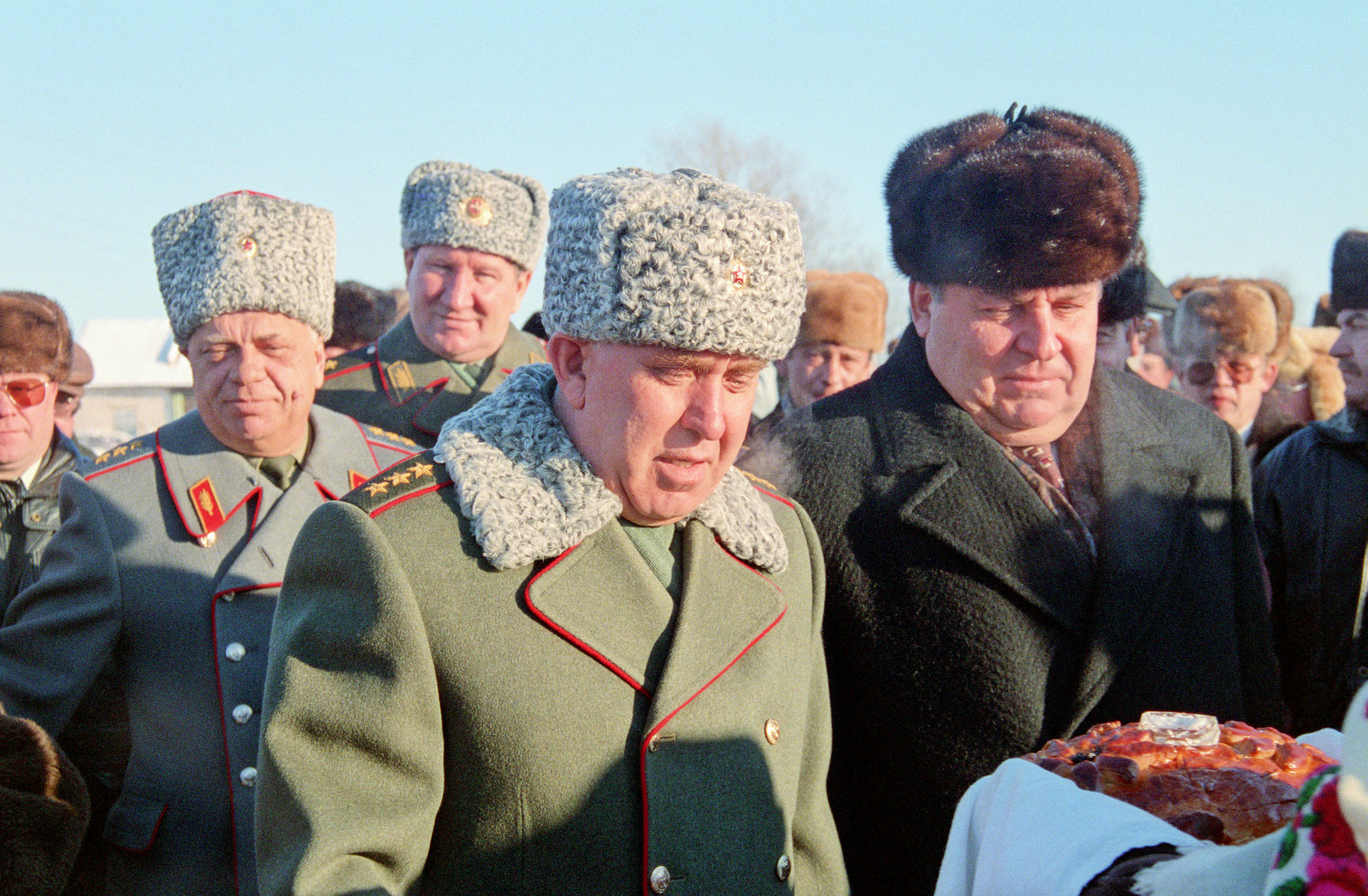 Открытие бронзового бюста Героя Социалистического труда Михаила Ильича Кошкина в селе Брынчаги. Слева направо: мужчина, генерал, генерал, генерал-полковник Сергей Александрович Маев (начальник главного автобронетанкового управления Министерства обороны РФ, позднее председатель Центрального совета ДОСААФ России), вдали Евгений Алексеевич Мельник (мэр Переславля-Залесского), мужчина, Евгений Иванович Проничкин (заместитель мэра Переславля по жилищно-коммунальному хозяйству). В правом углу хлеб-соль, которую предложили генералу Маеву.